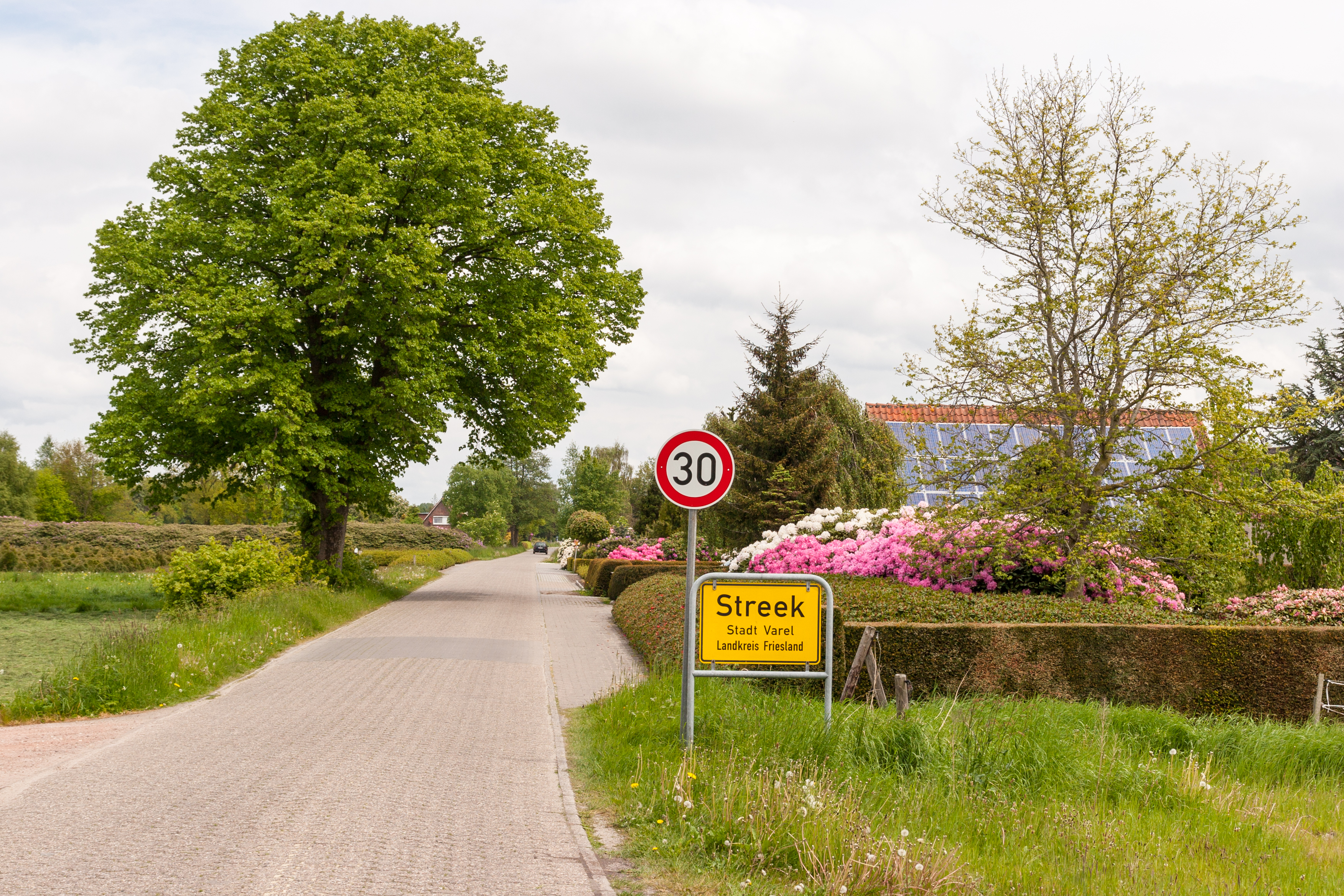 Streek(moorweg), Stadt Varel/Jadebusen